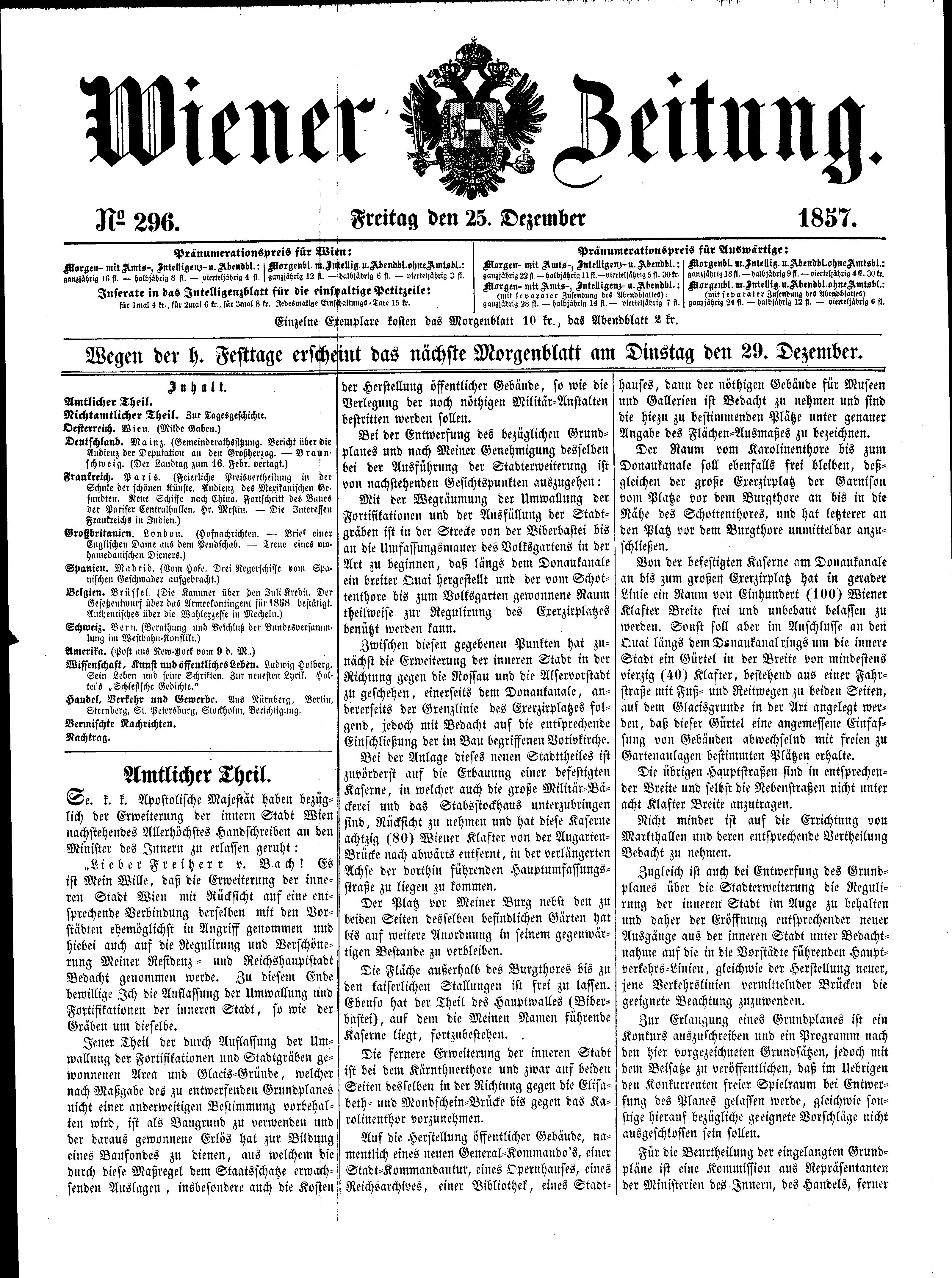 Wiener Zeitung vom 25.12.1857 Seite 1 mit dem „Handschreiben“ Kaiser Franz Josefs I. zur Stadterweiterung